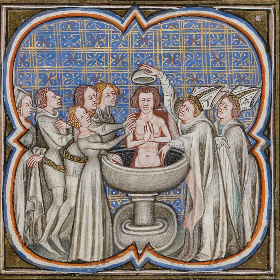 Baptême de Rollon en 912 dans la cathédrale de Rouen, d'après une miniature.